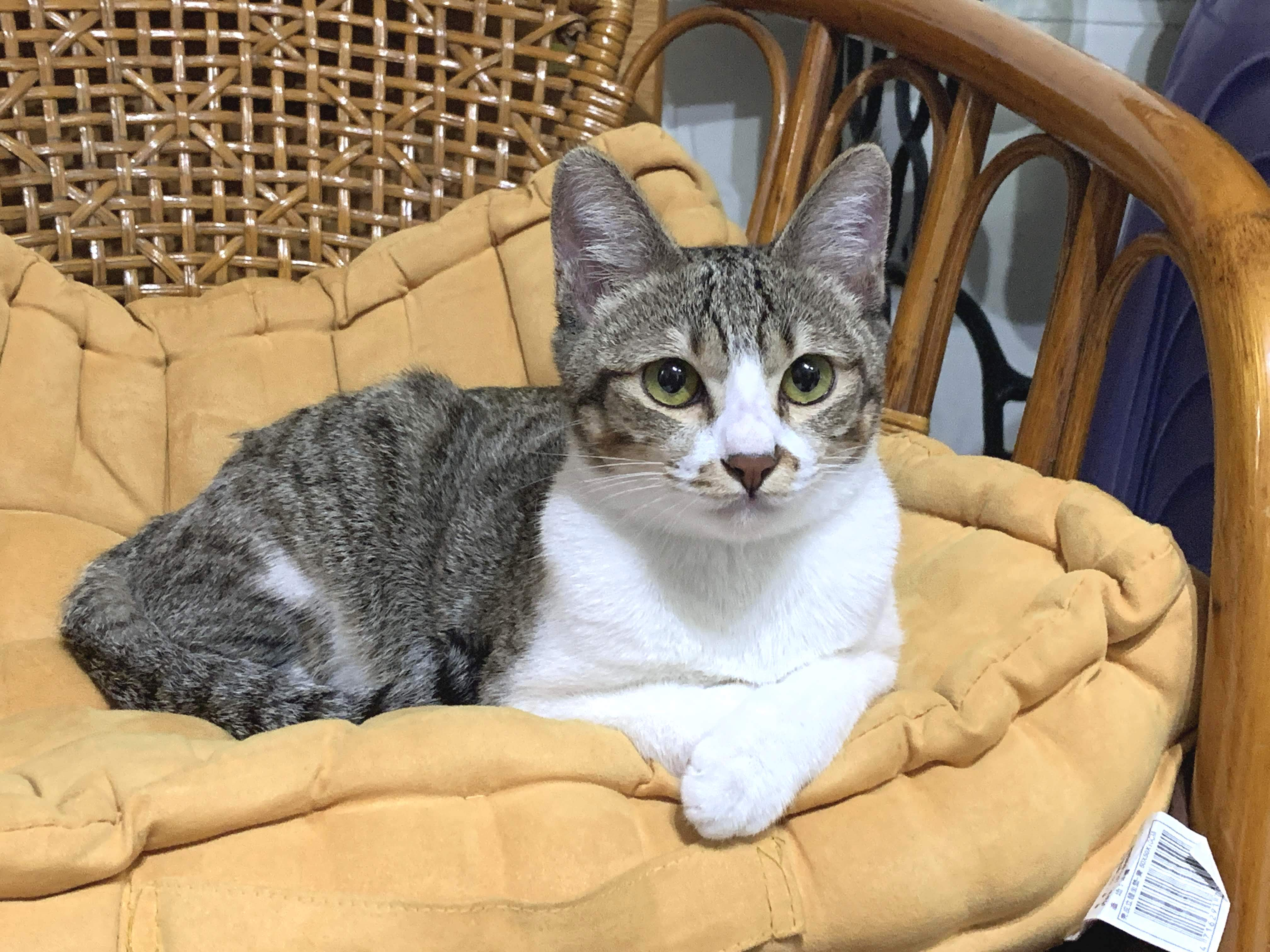 愛琴海混種短毛貓的照片。